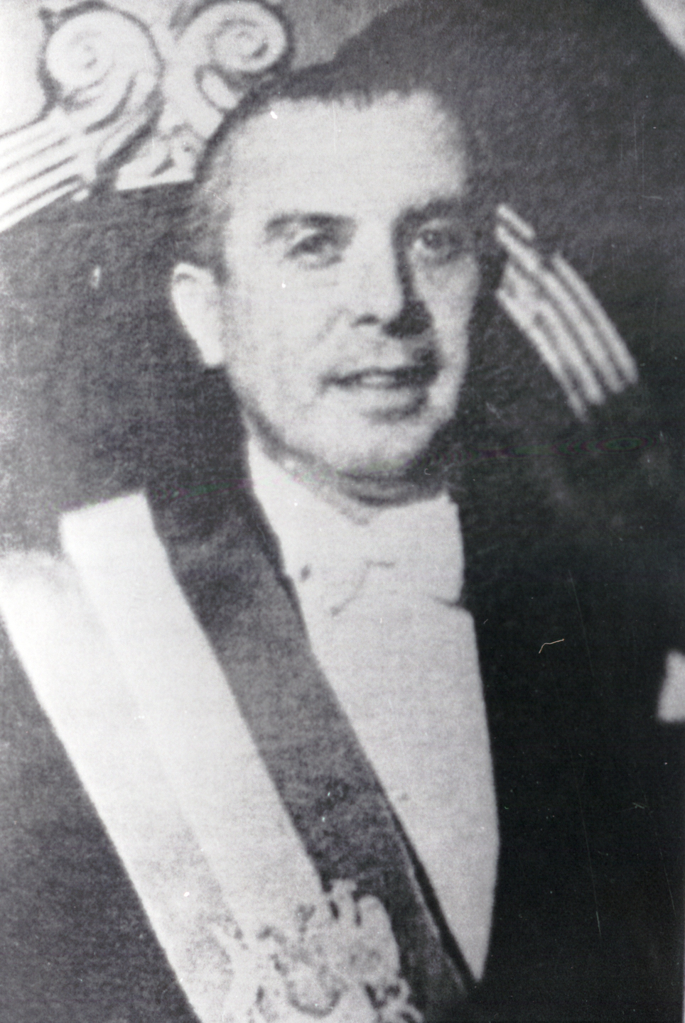 Gabriel González Videla, Presidente de la República.